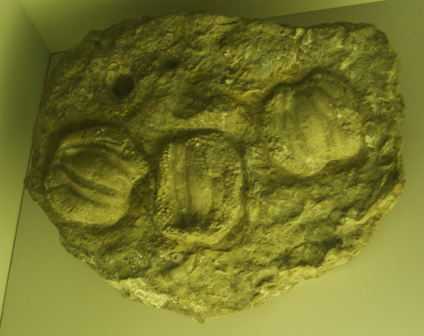 Fossil of Melonechinus, an extinct echinoderm- Took the photo at Senckenberg Museum of Frankfurt